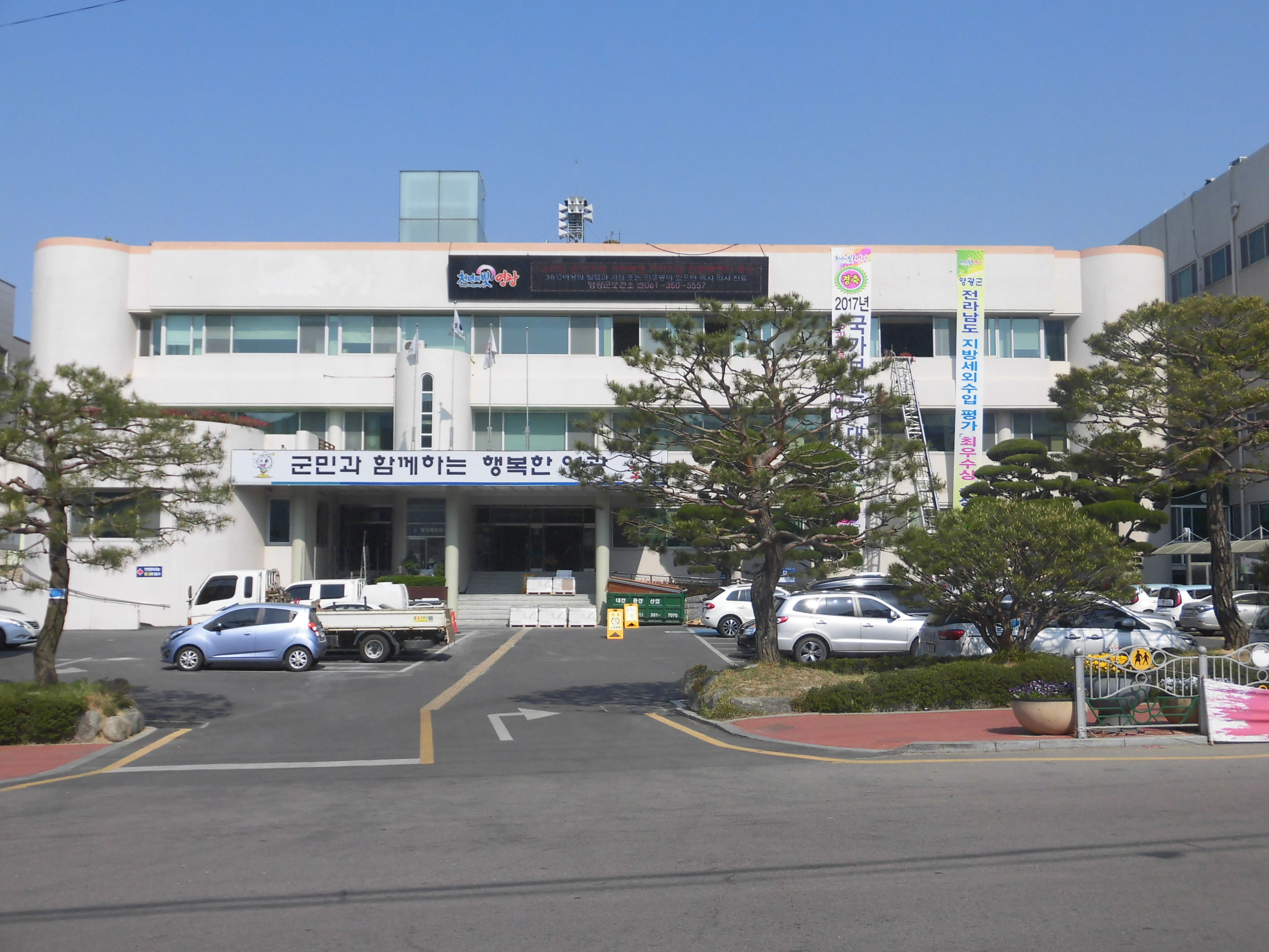 전라남도 영광군에 있는 영광군청